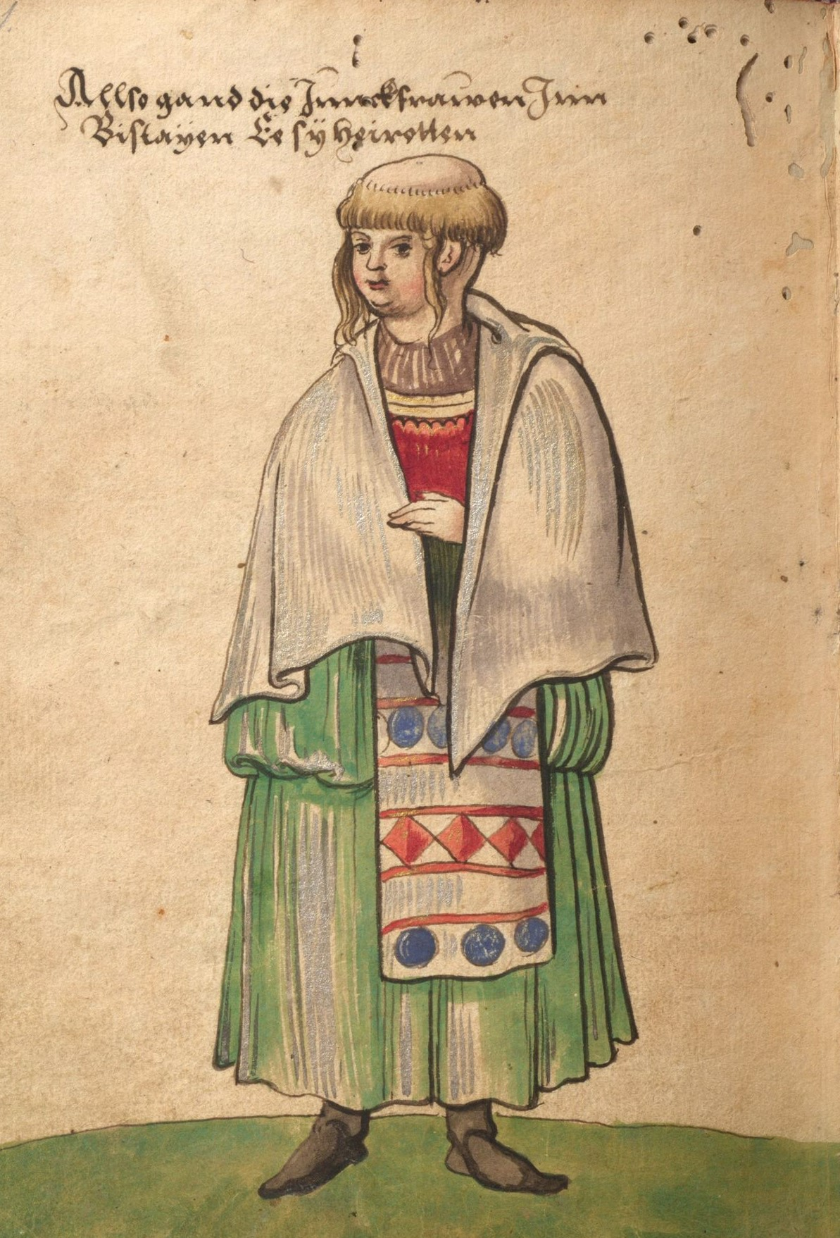 XVI. mende erdialdeko neska euskaldun bat (1530), Christoph Weiditzek marraztua